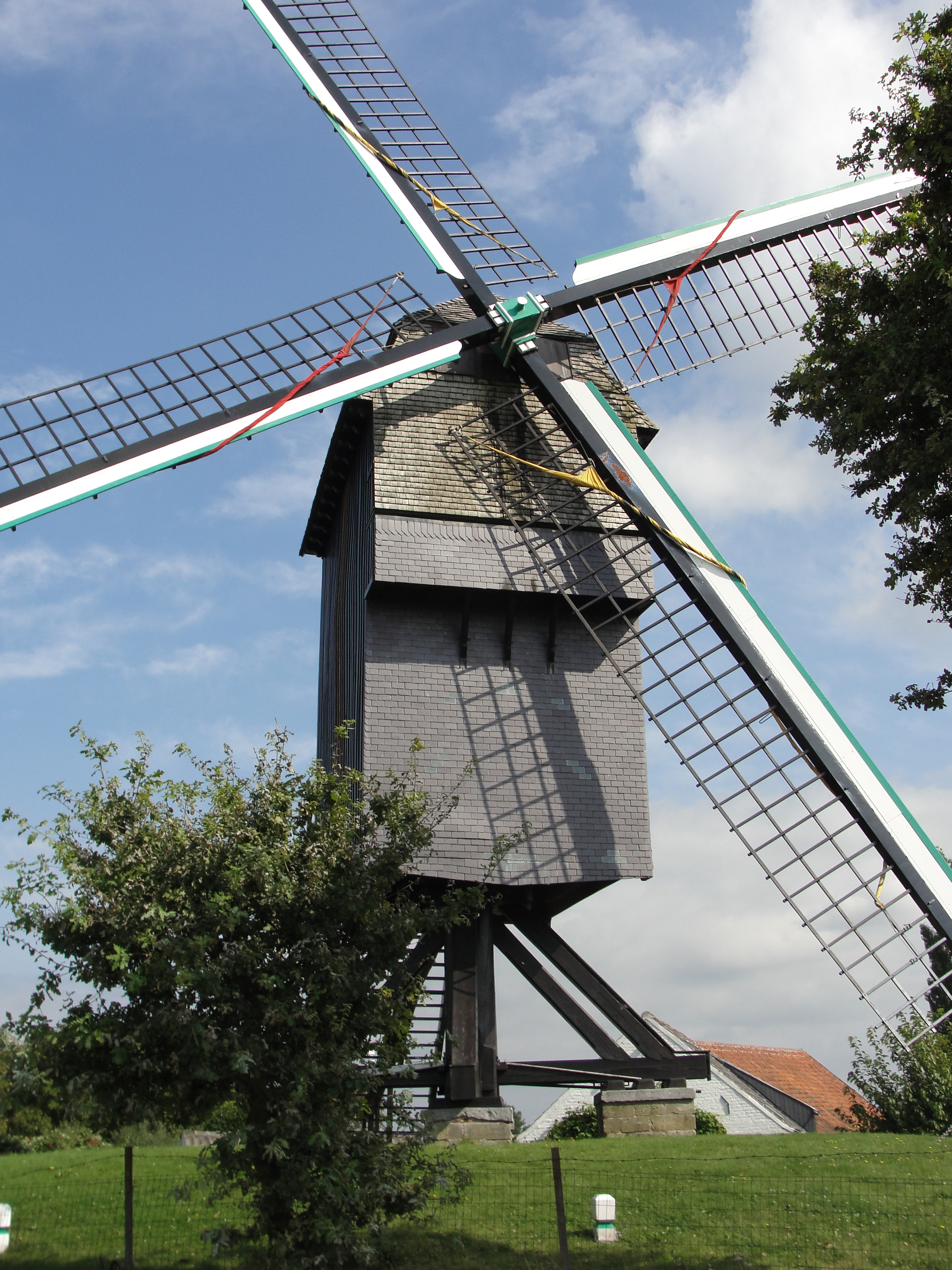 Hertboommolen, ook Tragische molen of Zepposmolen genoemd, in Onze-Lieve-Vrouw-Lombeek (Roosdaal)